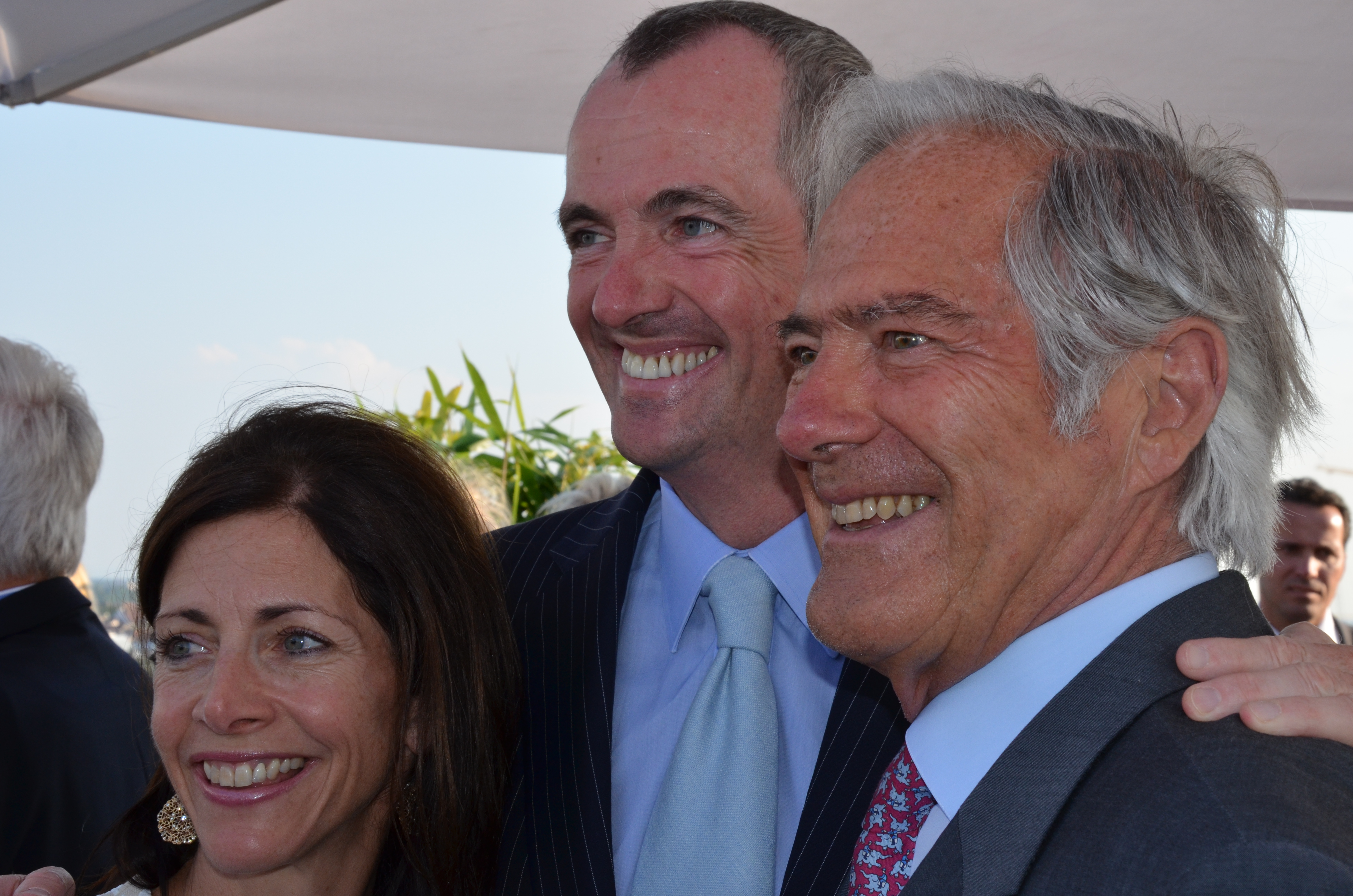 Tammy Snyder Murphy, Philip D. Murphy und Roland Berger, Juli 2012